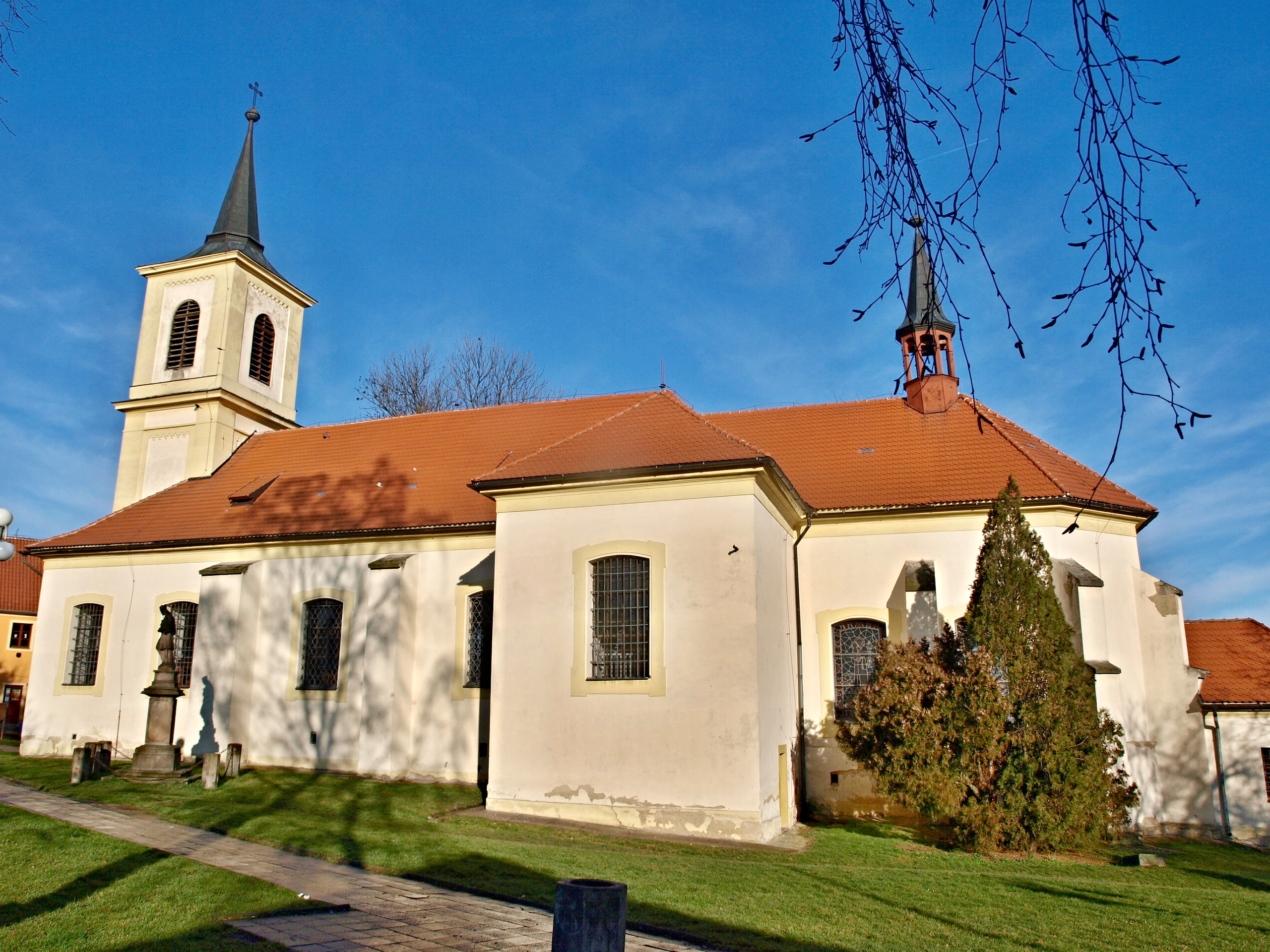 Nové Strašecí, kostel Panny Marie